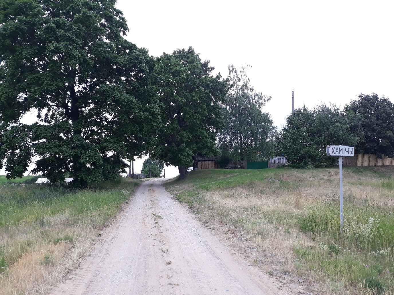 вёска ўлетку 2018